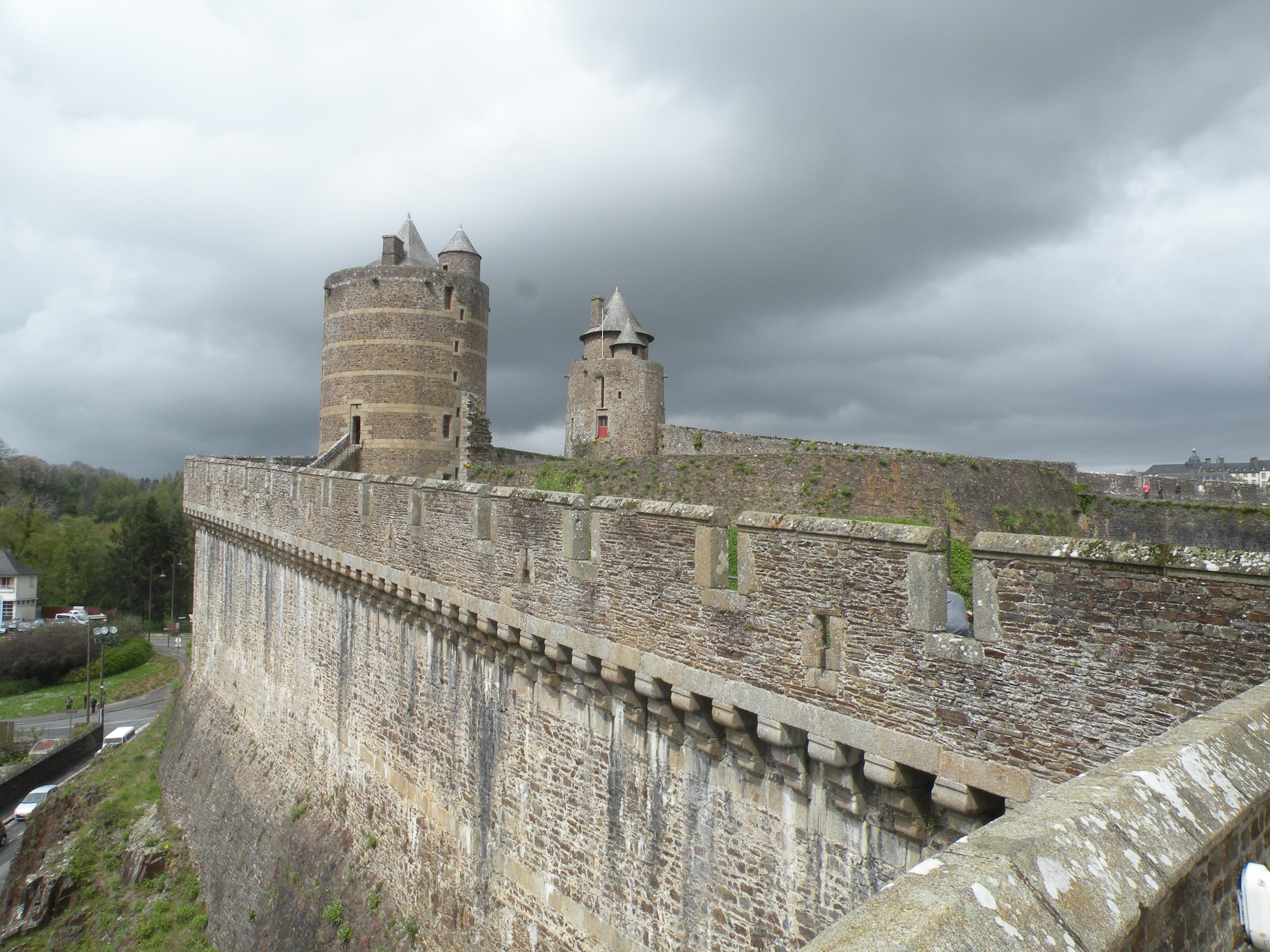 château de Fougères